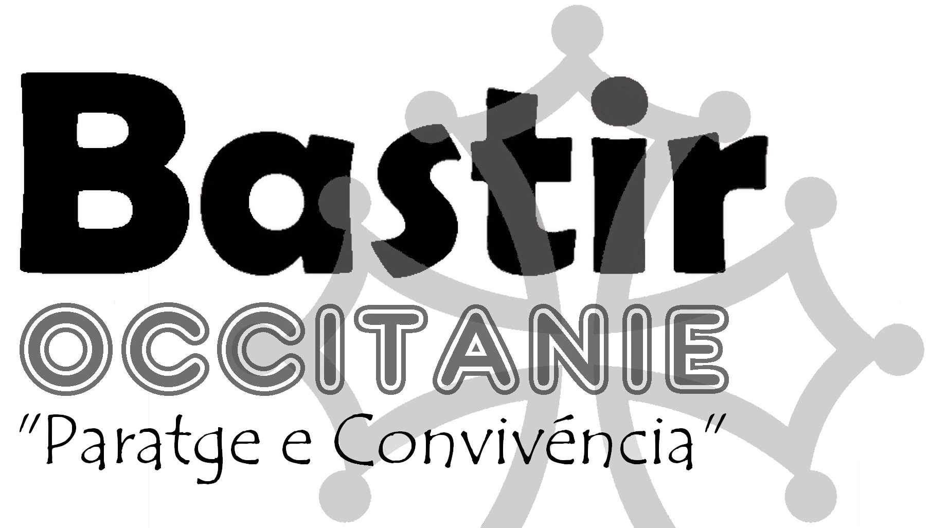 Logo BASTIR OCCITANIE à partir de 2016